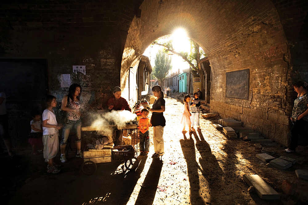 张家口桥西区堡子里四门洞